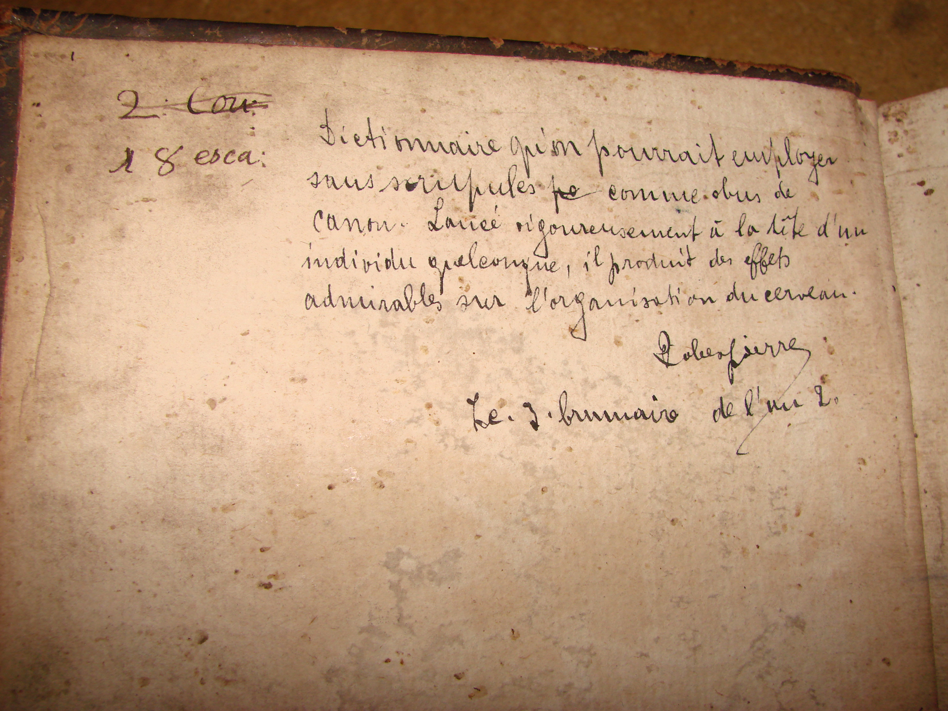 "Widmung" von Robespierre in einem Wörterbuch von 1770Lëtzebuergesch: "Widmung" vum Robespierre an engem Dictionnaire vun 1770